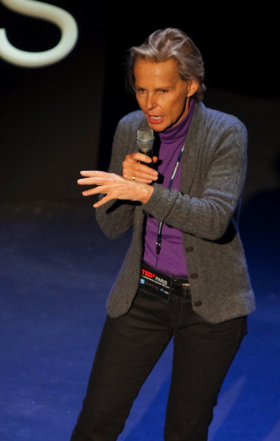 Christine Ockrent lors de la conférence TEDx Paris 2010